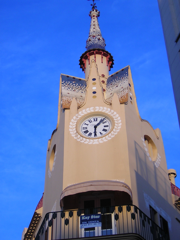 Casa modernista de Bartomeu Carbonell, o Del Rellotge, al Cap de la Vila de Sitges (Catalunya,Spain)